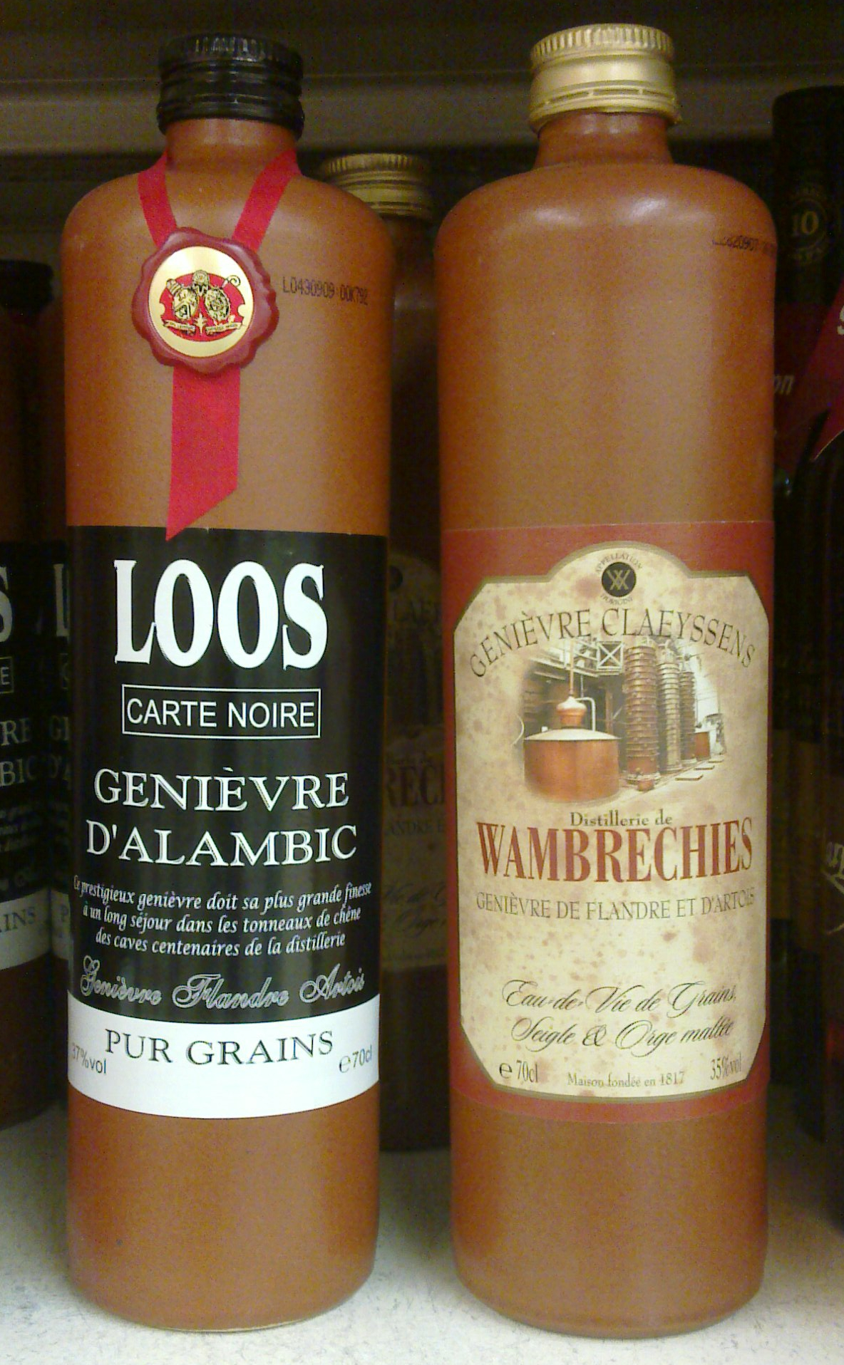 Bouteilles traditionnelles de genièvre français : genièvre Carte Noire de Loos et Claeyssens de Wambrechies.